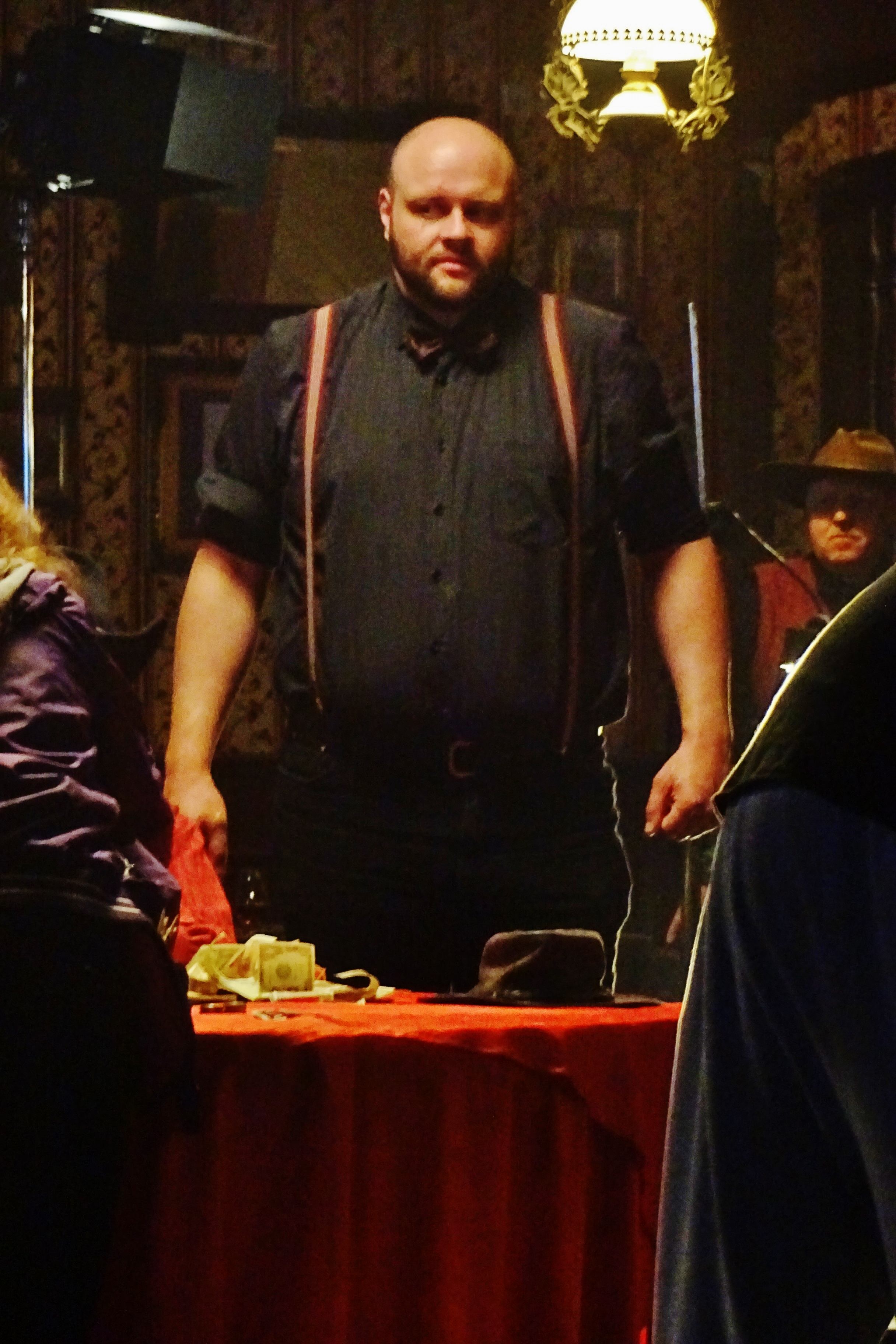 Filmdreh "Wölfe", Matthias Schmidt